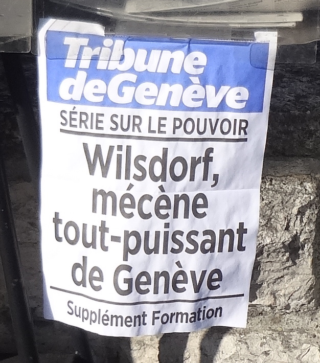 Manchette de la Tribune de Genève, du 2 février 2018, relative à la fondation Hans Wilsdorf.